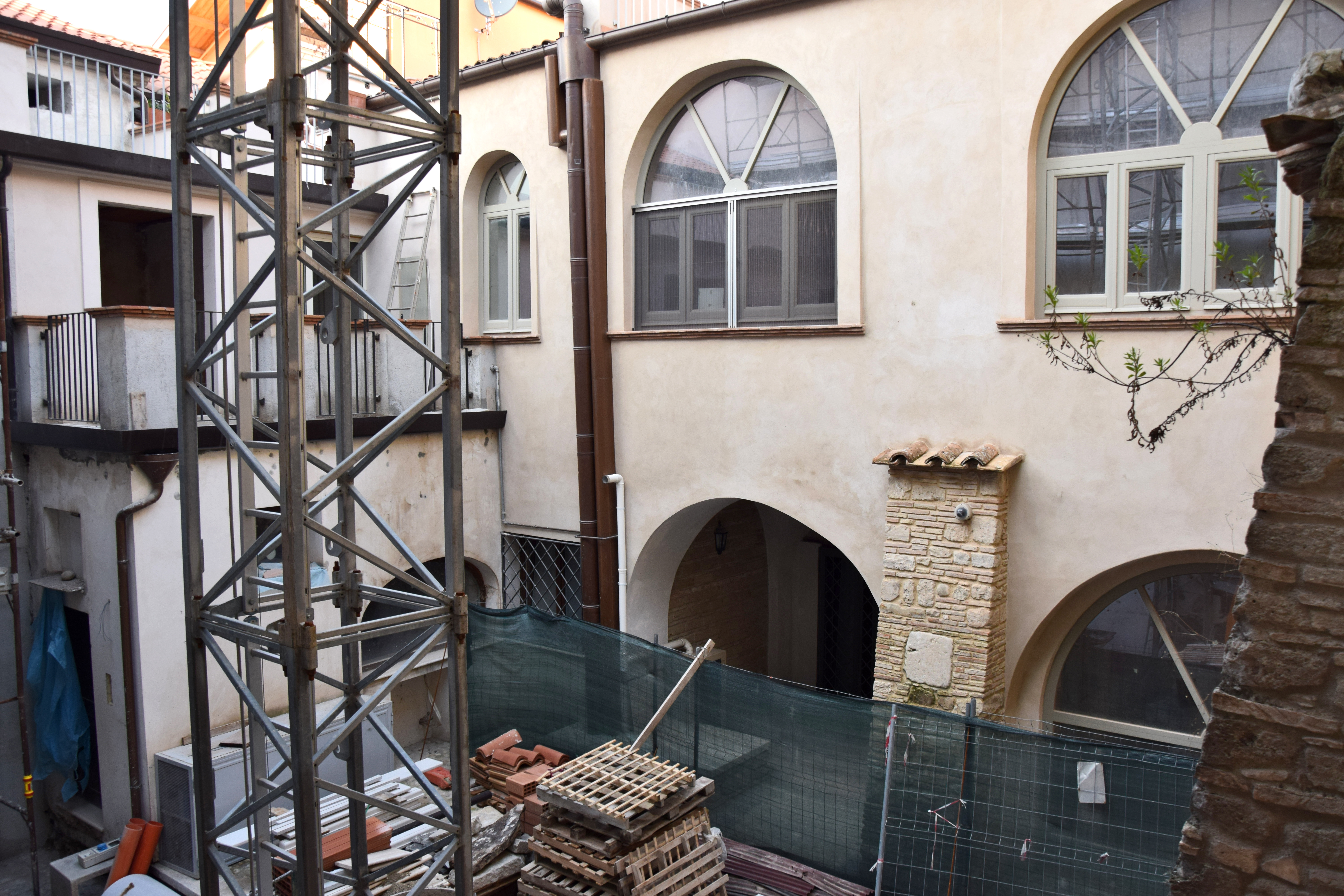 'ex monastero benedettino di San Vittorino a Benevento.